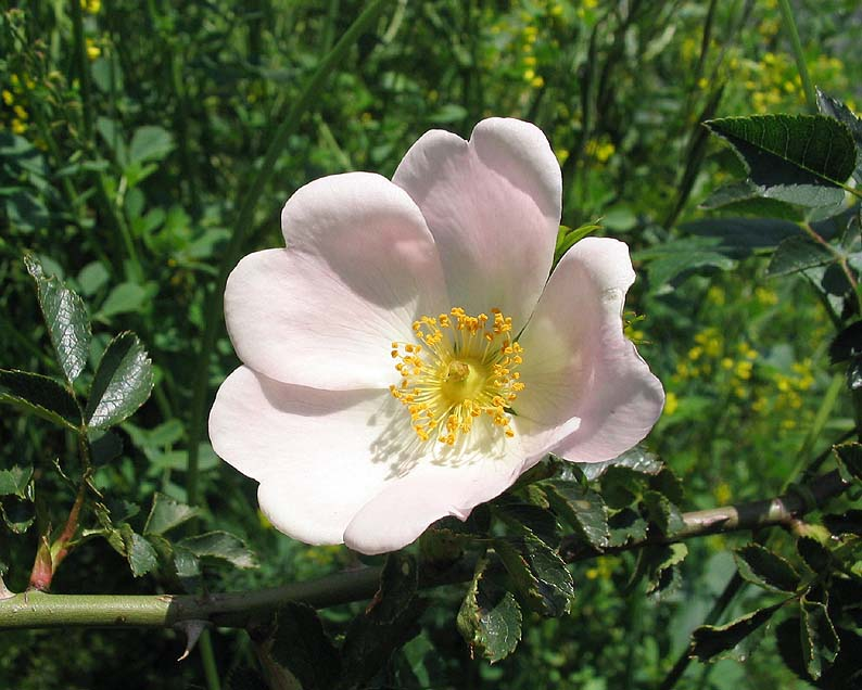 Fleur de Rosa canina (églantier)Photo prise à Vinça (Pyrénées-Orientales) en mai 2004